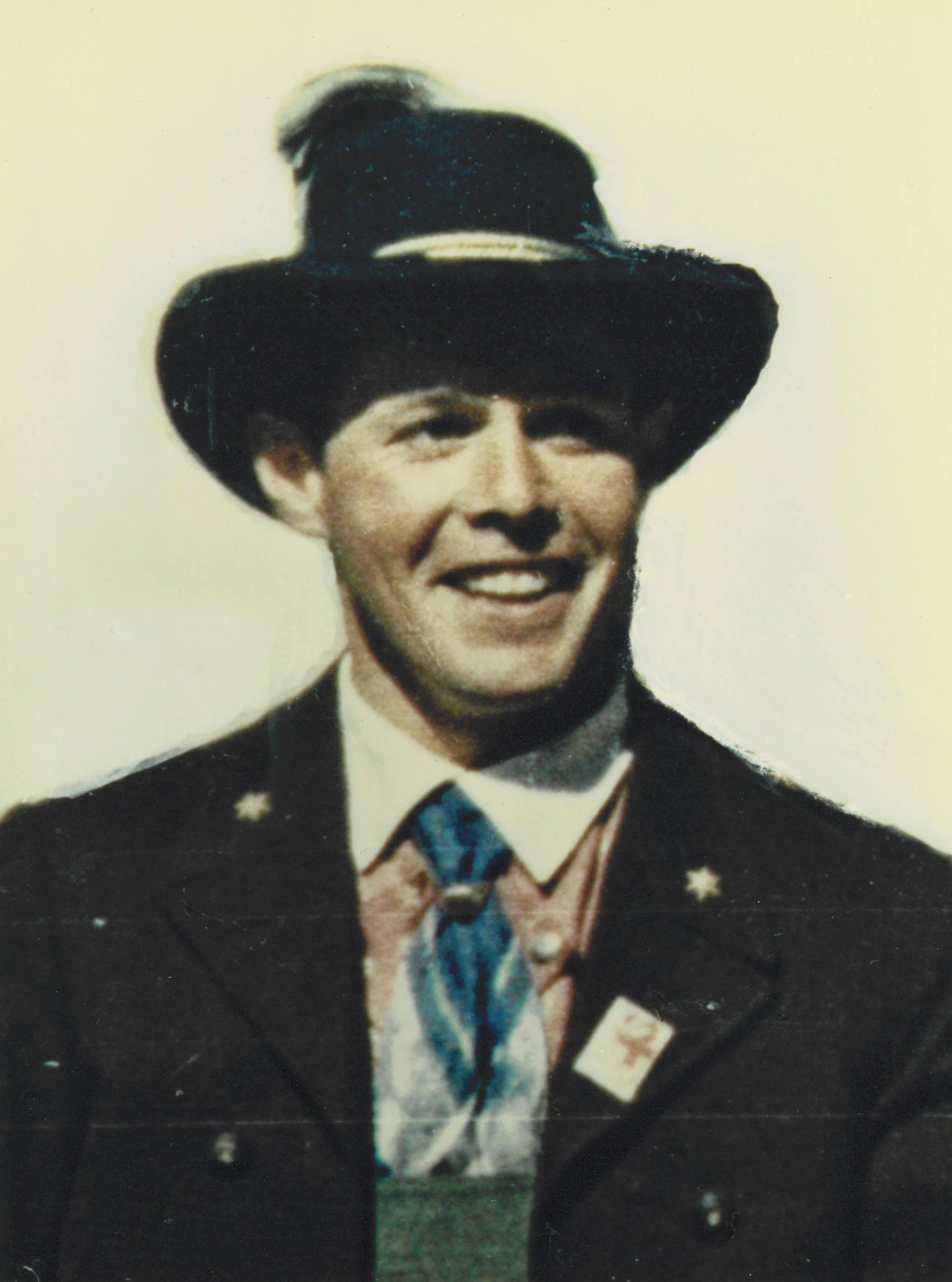 Luis Amplatz 1959